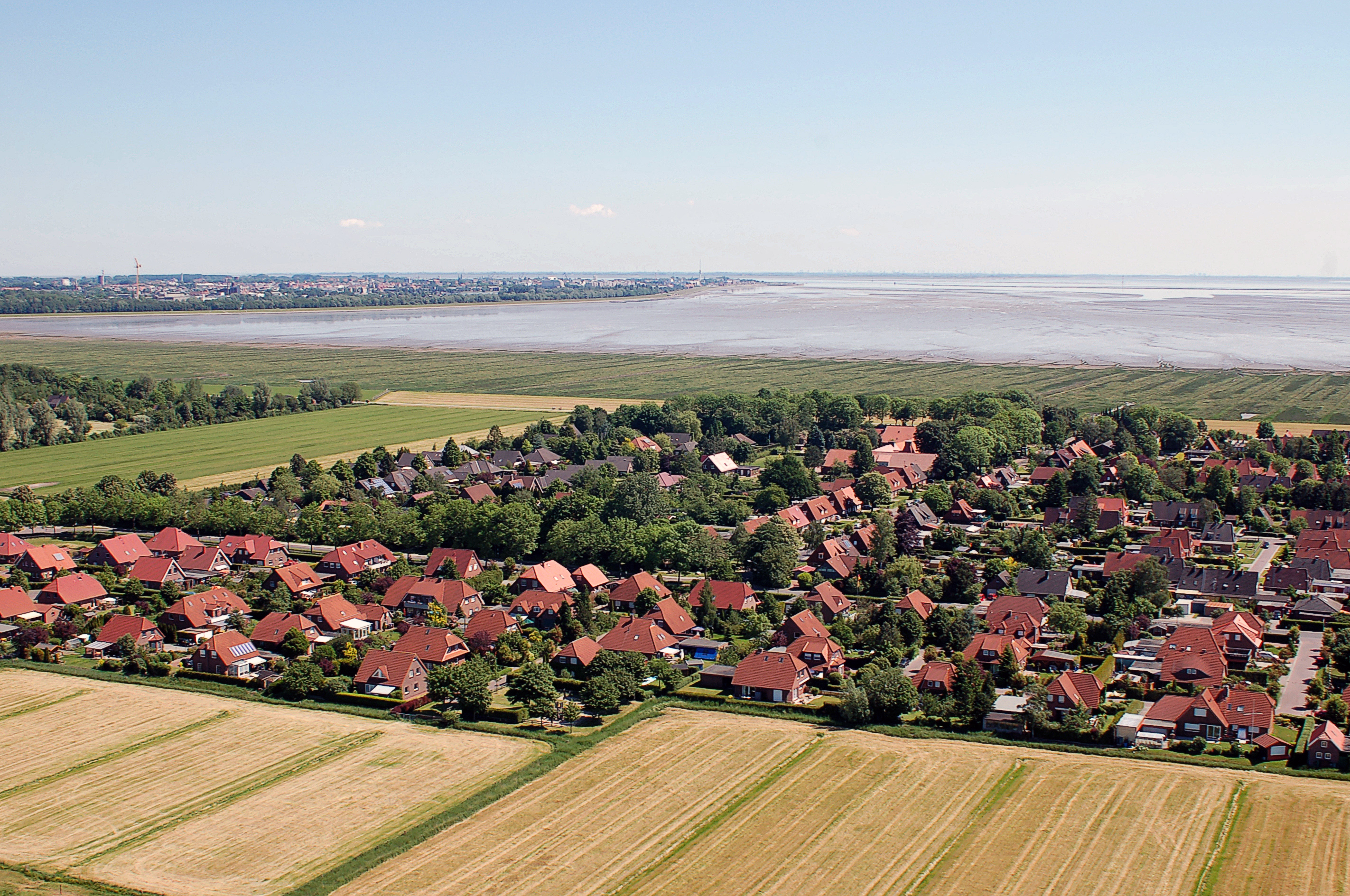 Luftbilder von der Nordseeküste 2012-05